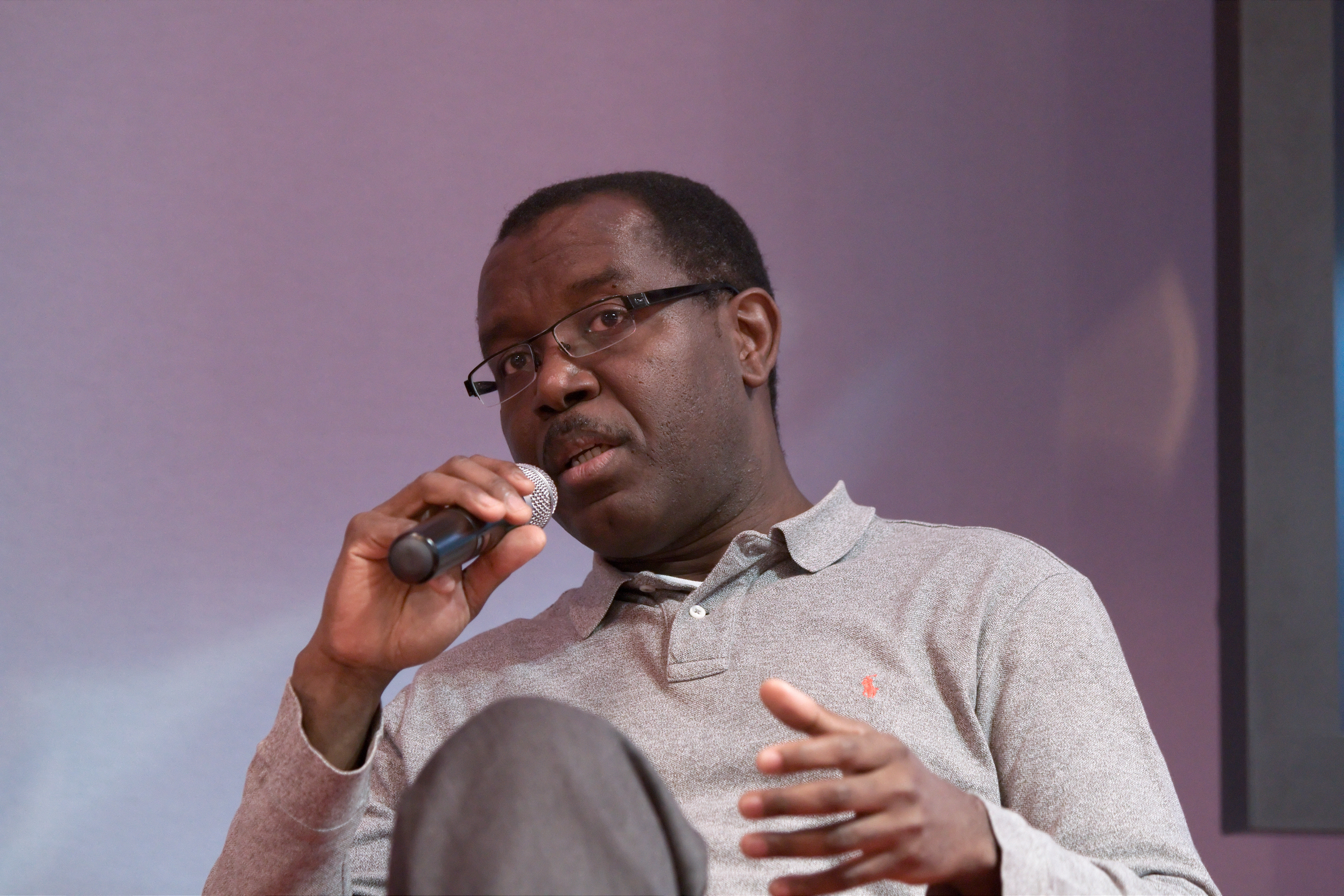 L'auteur Louis-Philippe Dalembert lors du Salon du livre de Paris pour le débat Haïti : c'est la culture qui nous sauvera.